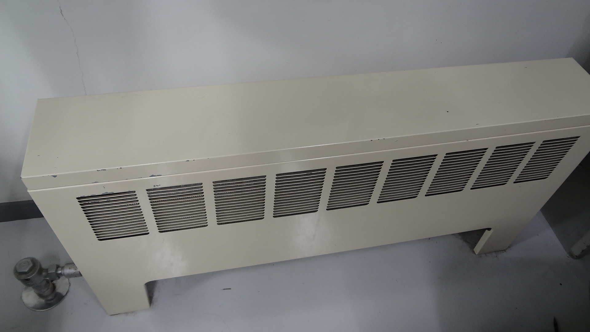 東京工業学生寮暖房